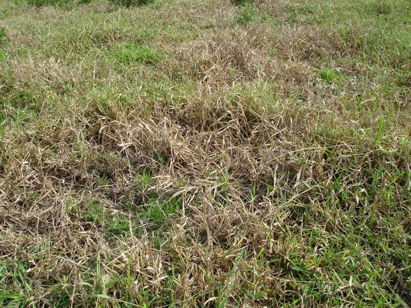 Pastagem de capim-marandu (Brachiaria brizanhta com sintomas da síndrome da morte do capim-marandu (capim-braquiarão)